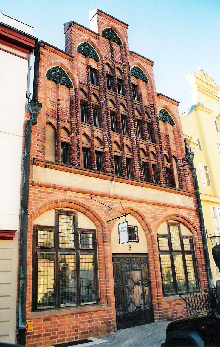 Stralsund (Germany), Dielenhaus Fotograf: Benutzer:Klugschnacker, 2006-07-xx